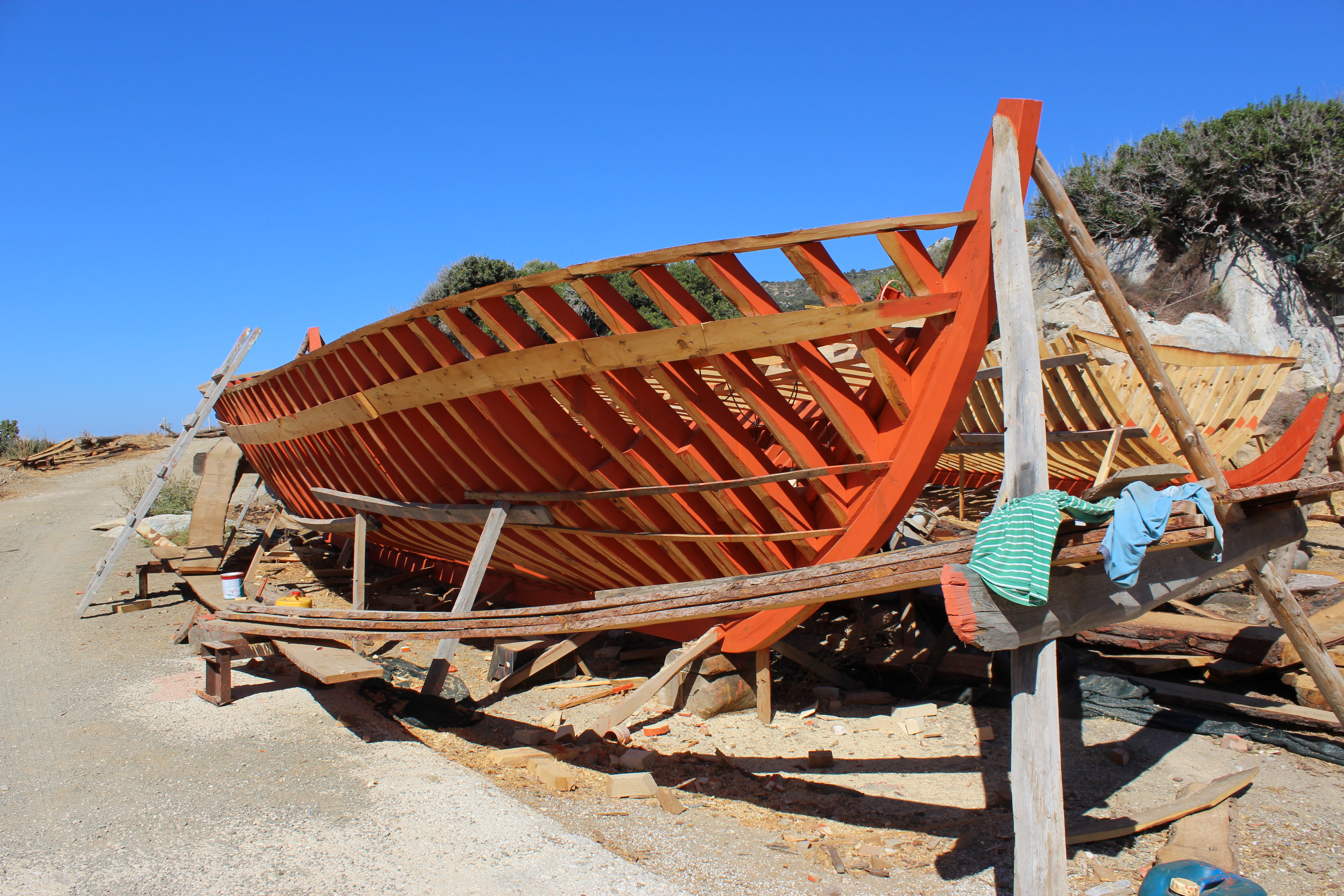 A Kaíki in a shipyard in Ag. Isidoros, Samos